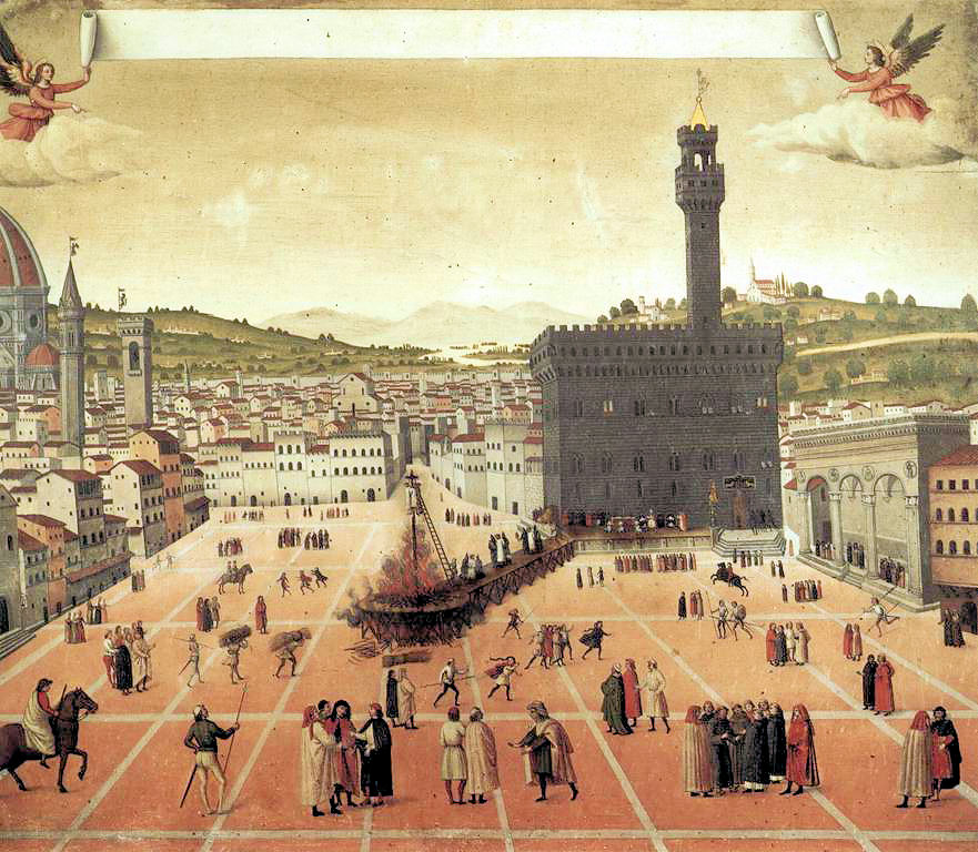 Hanging and burning of Girolamo Savonarola in Piazza della Signoria in Florence in 1498.